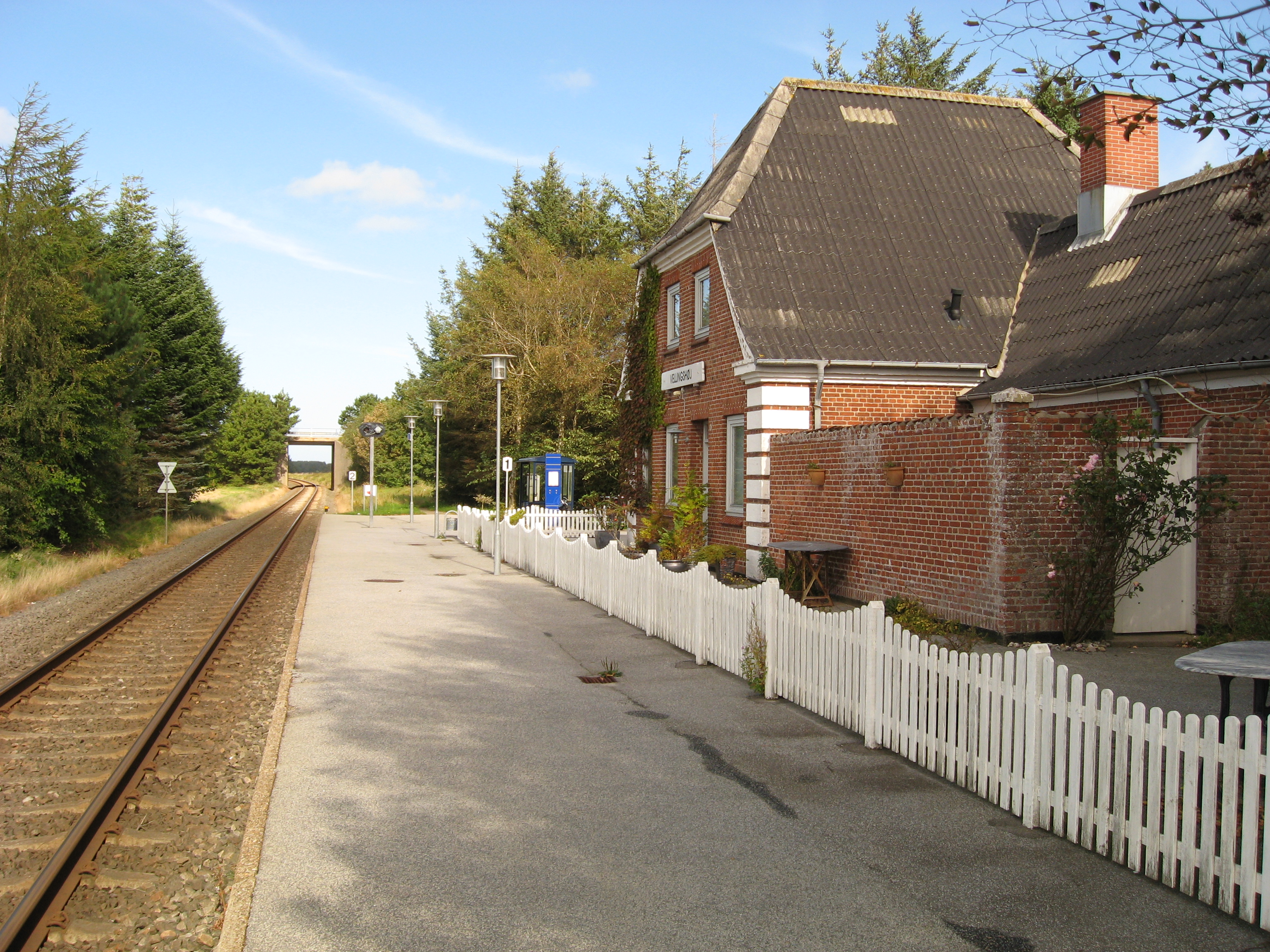 Vellingshøj Station er en dansk jernbanestation i Vellingshøj, i det nordlige Hjørring, mellem Herregårdsparken Trinbræt og Vidstrup Station.